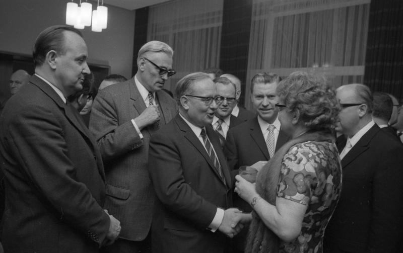 Empfang der La. Vertr. Niedersachsen anl. Geburtstag von Frau Min. Maria Meyer-Sevenich (v.l.n.r.: MdB Genscher; ?; MdB Hirsch, SPD-Fraktionsvorstand; Richard Stücklen; MdB Frehsee, SPD-Fraktionsvorstand; Frau Minister Meyer-Sevenich; Staatssekretär Dr. Morgenstern, Diers. Ministerium für Bundesangelegenheiten, für Vertriebene und Flüchtlinge)